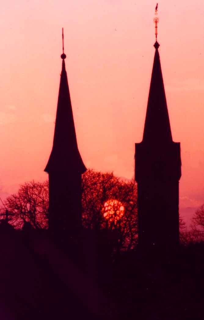 Monduntergang in Vendersheim im Mai zwischen den beiden Kirchtürmen (kath. Kirche links im Vordergrund; ev. Kirche rechts), Rheinland-Pfalz, Deutschland.